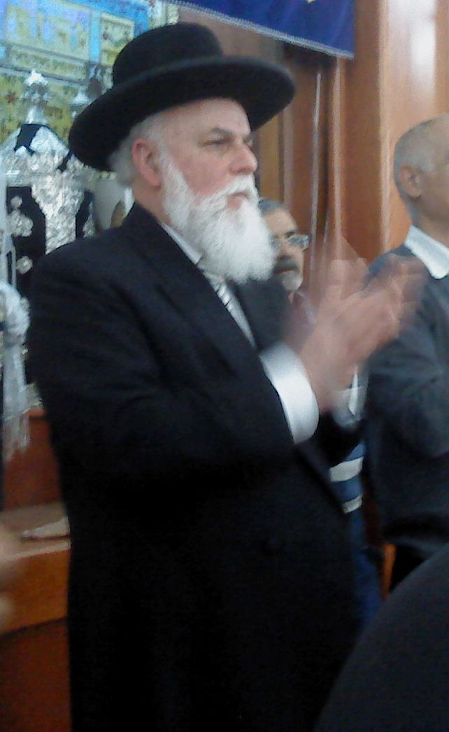 הרב יצחק חיים פרץ